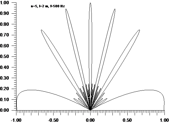 Характер на насочеността на квазицилиндричен източник с крайна дължина